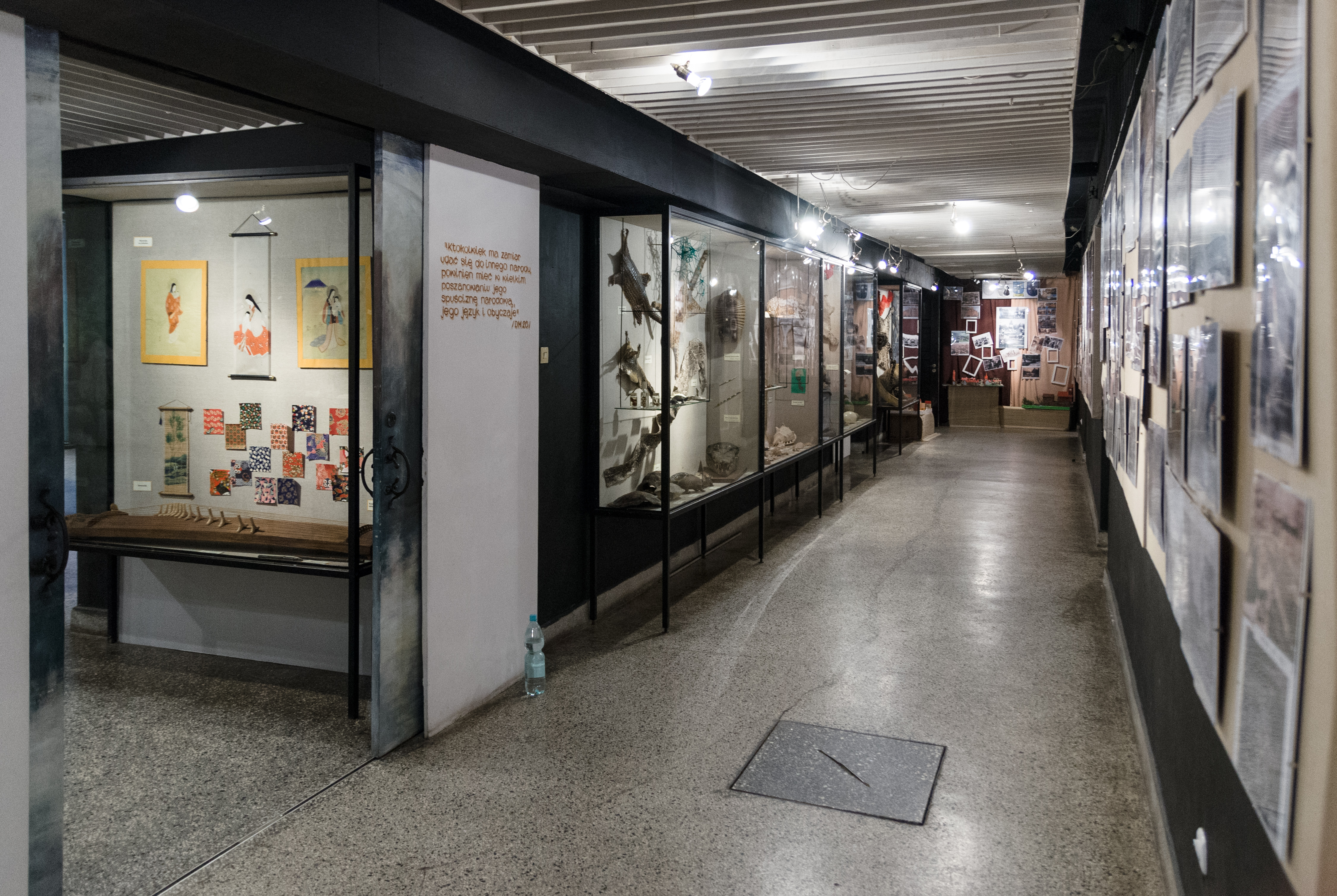 Muzeum Etnograficzn-Misyjne Księży Werbistów w Pieniężnie.